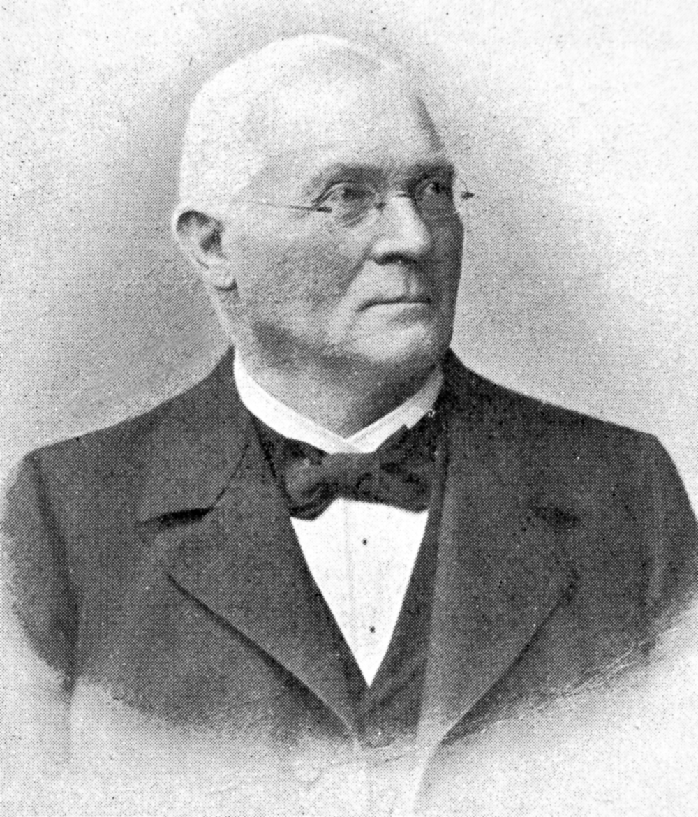 Bildnis des preußischen Bergbeamten Johann Friedrich Hermann Pinno, "Wirklicher Geheimer Oberbergrat" und "Berghauptmann a. D.".